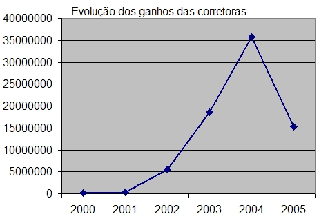 Valores em reais. Fonte (dos dados): CPMI dos Correios.